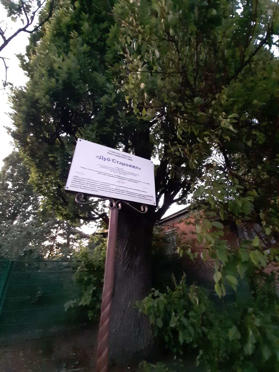 Дуб старожил по Красной Ладожская